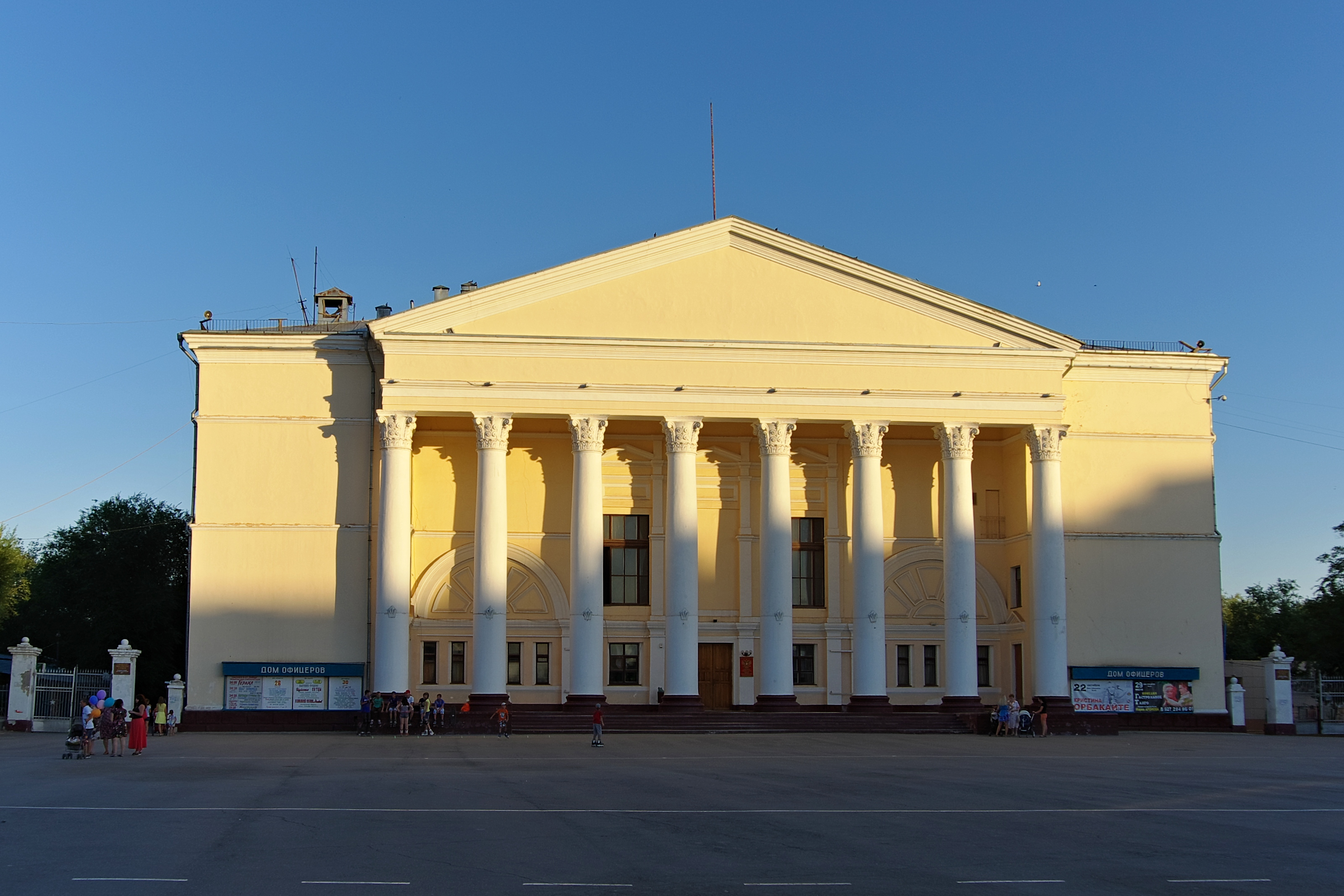 Дом офицеров (гарнизона): площадь Ленина, Ахтубинск, Ахтубинский район, Астраханская область